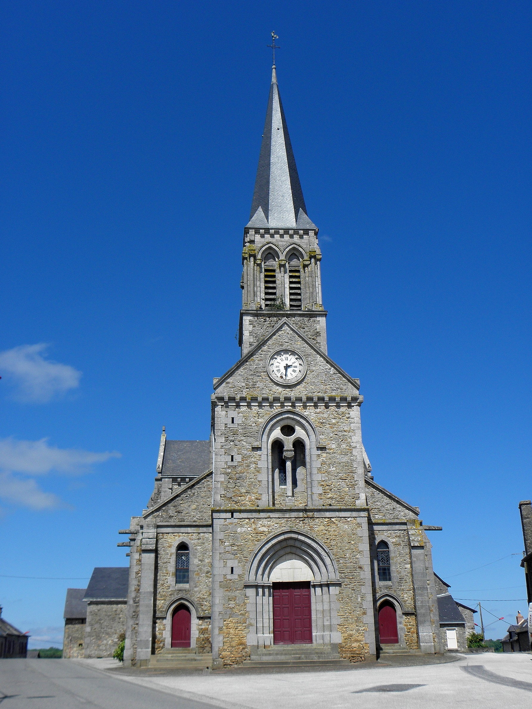 Église Saint-Gervais et Saint-Protais de Placé (53).